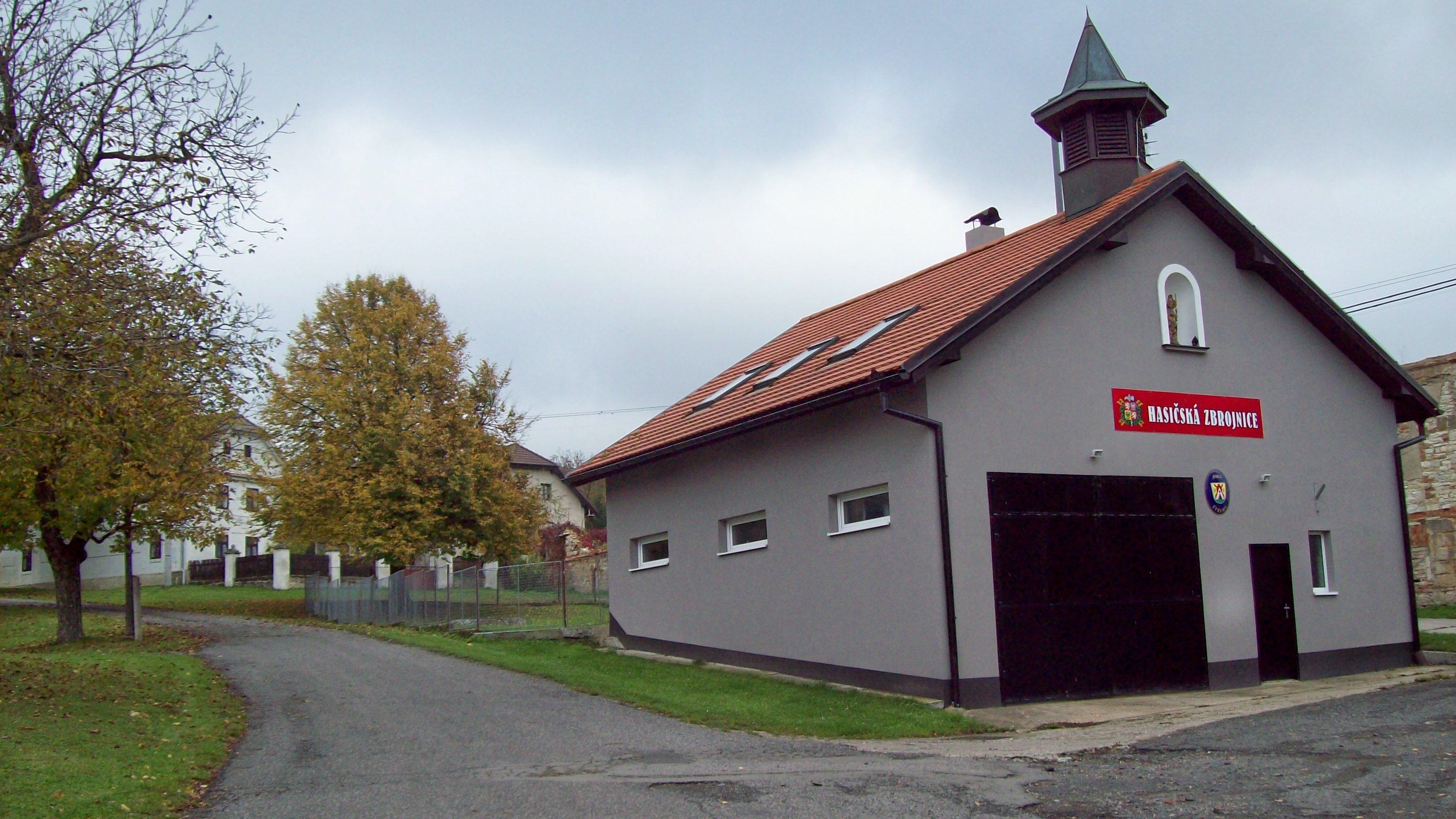 Hasičská zbrojnice, Střemy